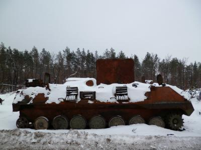 Техніка, знищена внаслідок артилерійського обстрілу.